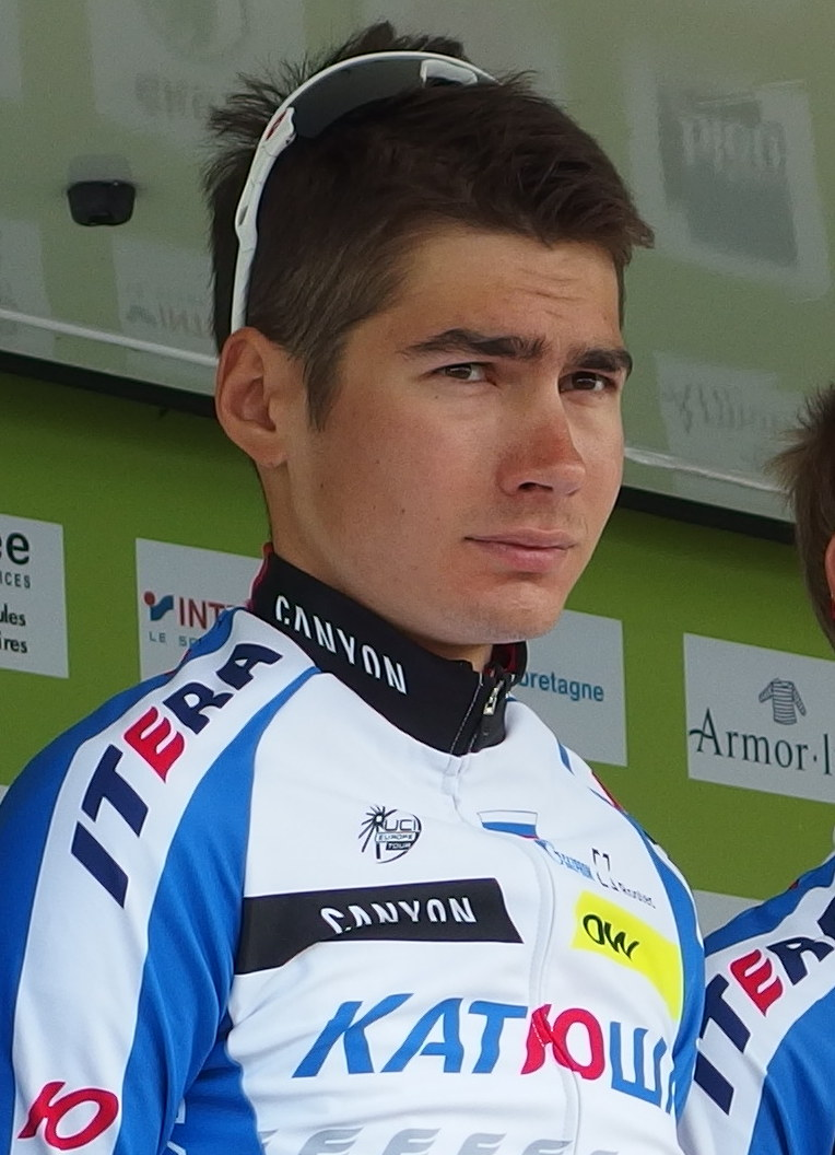 Tour de Bretagne 2015 - Présentation des équipes au départ de la troisième étape à Baud - Équipe Itera-Katusha Depicted person: Sergey Pomoshnikov